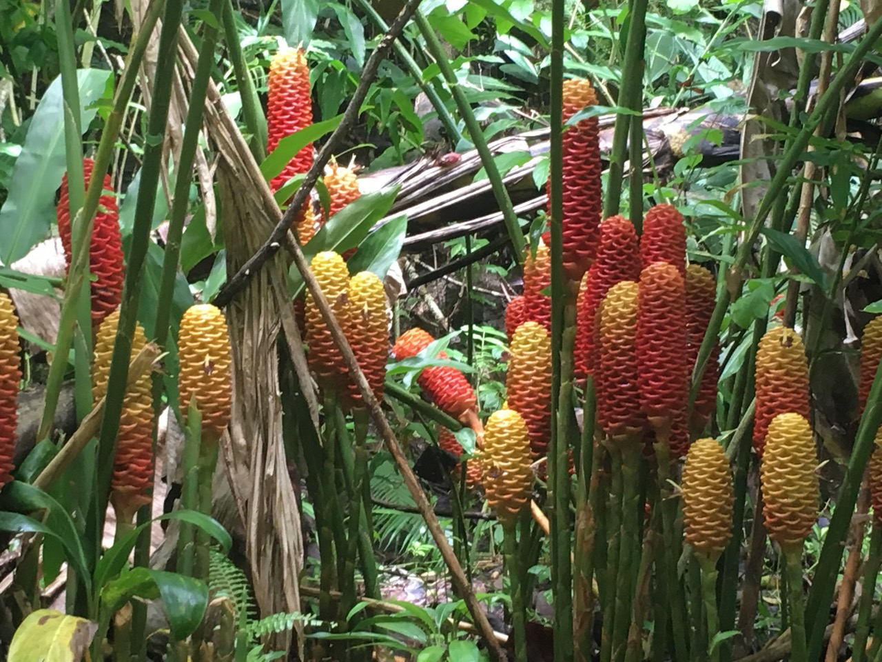 Zingiber spectabile